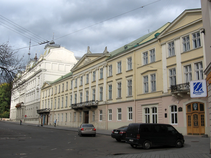 Дворец губернаторов Львов 002.jpg: Палац галицьких губернаторів. Львів